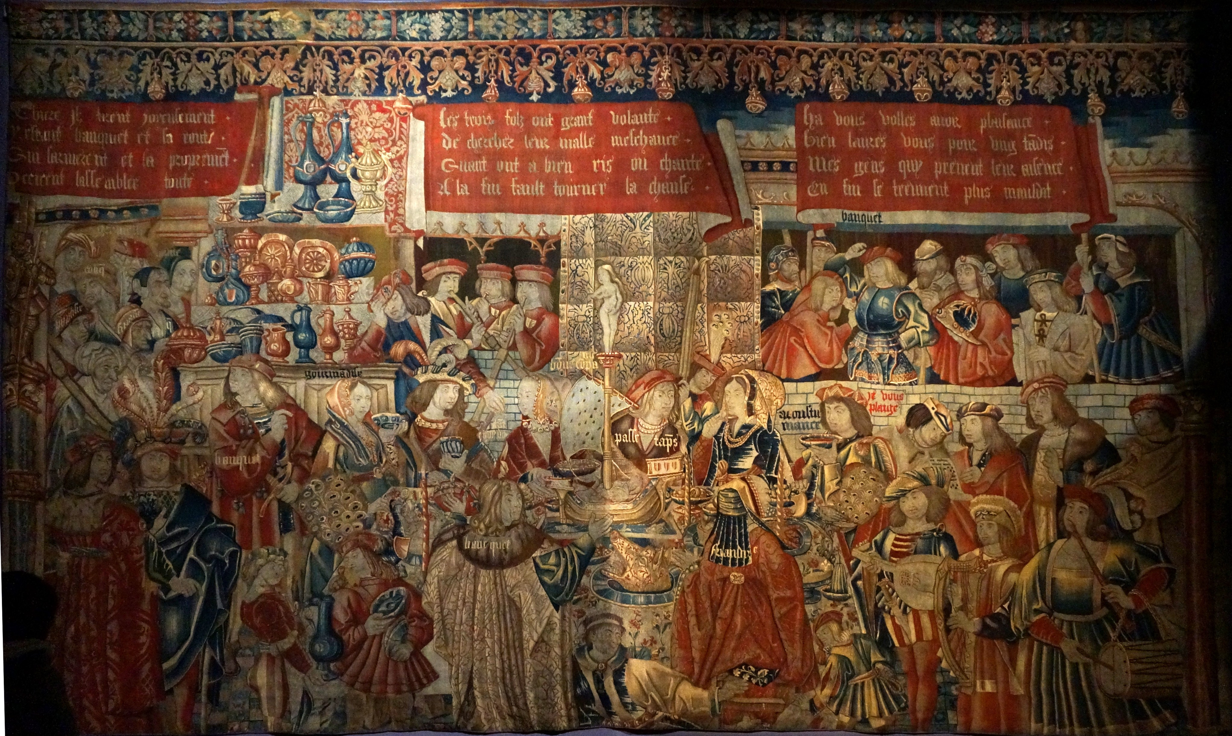 Tapisserie de Tournais : Condamnation de banquet.